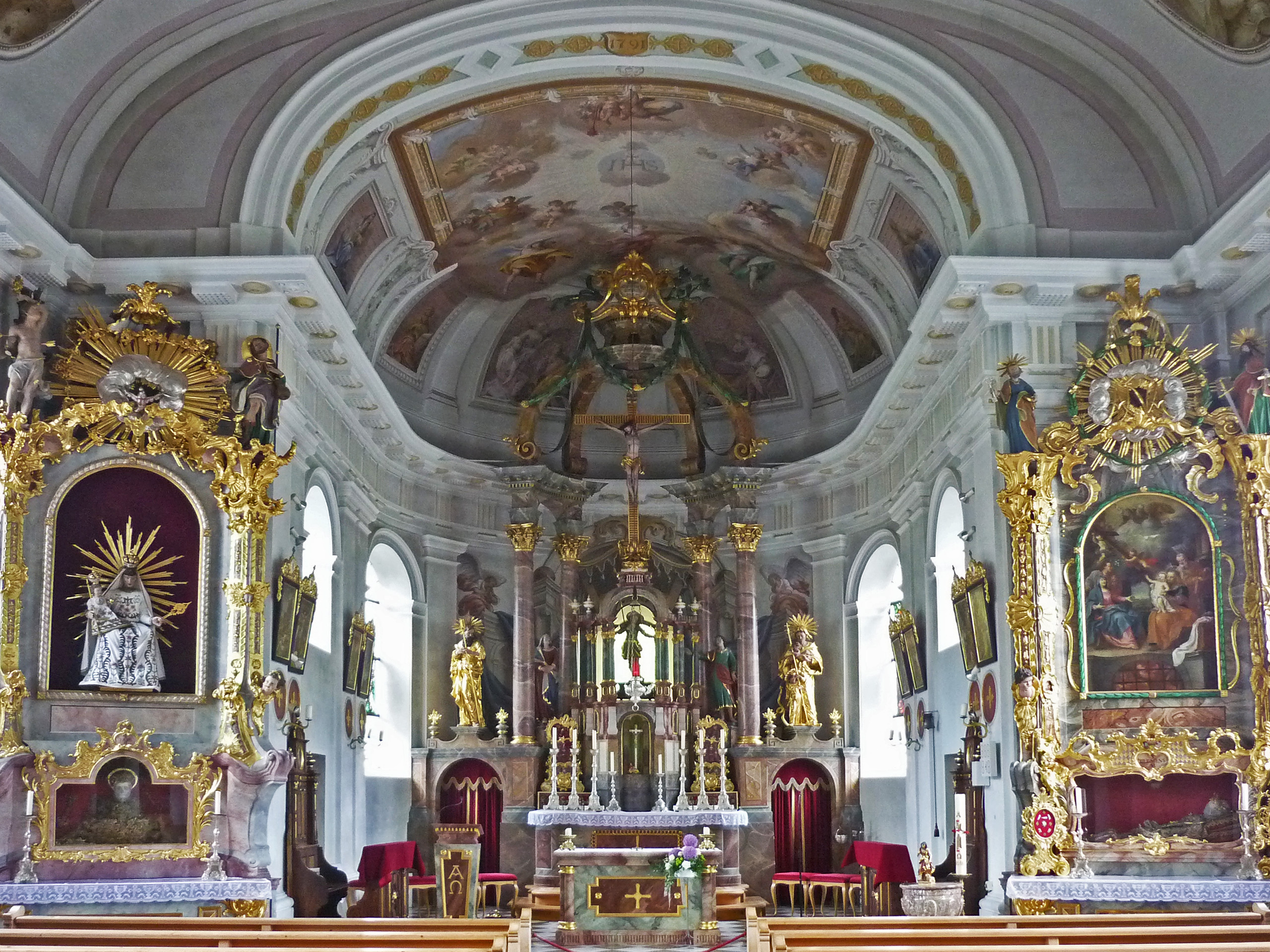 Kath. Pfarrkirche hl. Wendelin in Grän (Tirol)